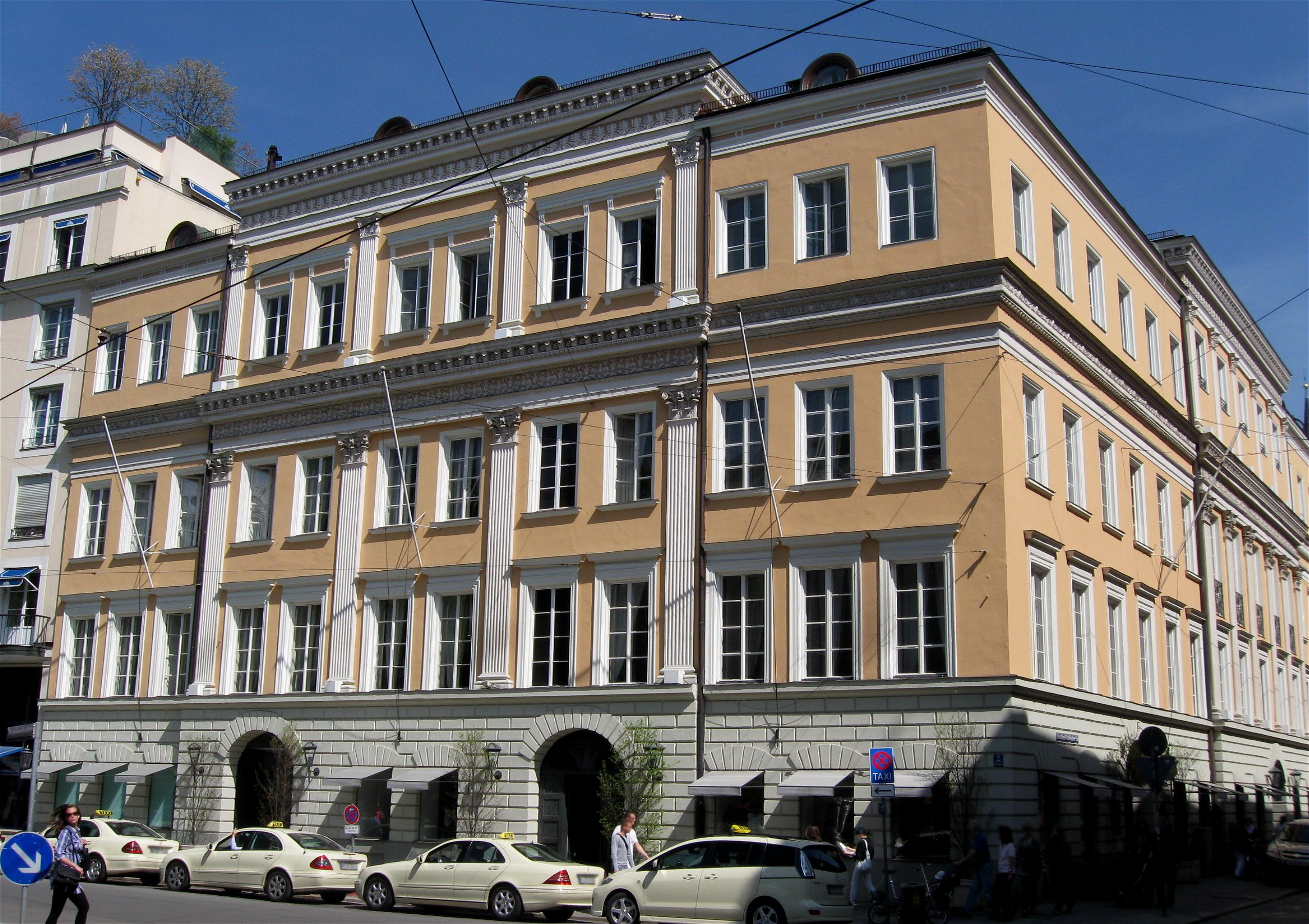 Promenadeplatz 2; Ehem. Palais Montgelas, jetzt Teil des Hotels Bayerischer Hof, stattlicher, klassizistischer Eckbau, 1810-13 von Emanuel Joseph von Herigoyen, innen von Jean Baptiste Métivier ausgestaltet; im 2. Stock Repräsentationsräume der Bauzeit (sog. Königssaal u. a.); 1876 aufgestockt. Zugehörig Kardinal-Faulhaber-Straße 14 a, Rückgebäude Prannerstraße 1, siehe dort.